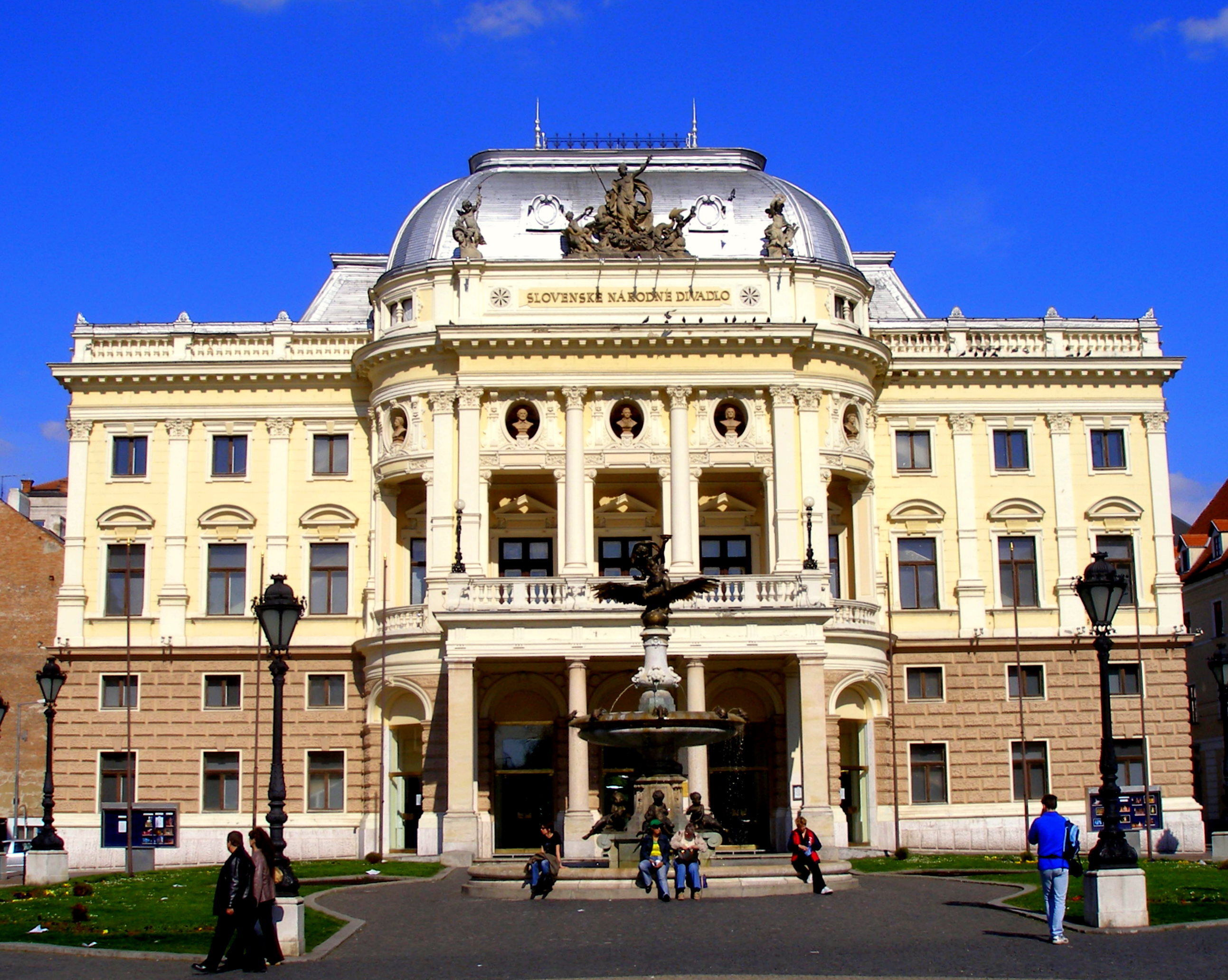 Fontána na Hviezdoslavovom námestí pred historickou budovou SND